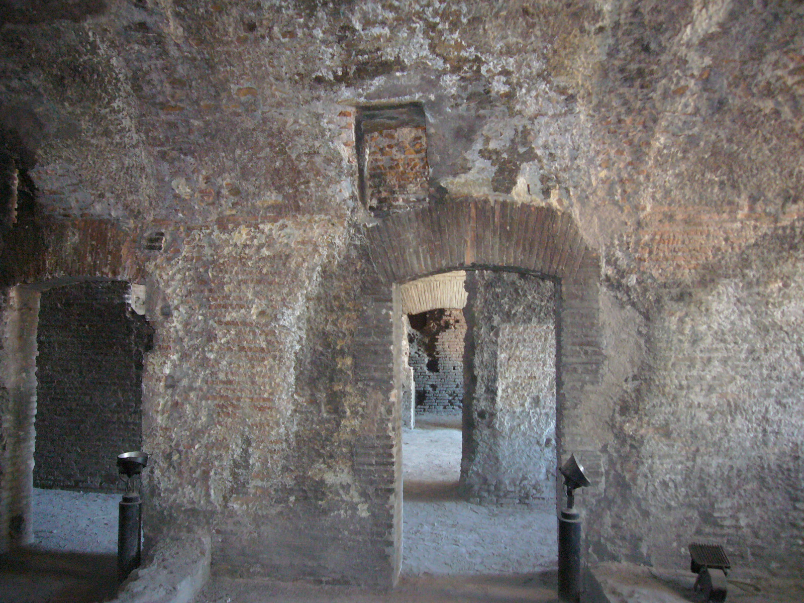 Roma, insula dell'Ara Coeli: ambienti interni del 2^ piano